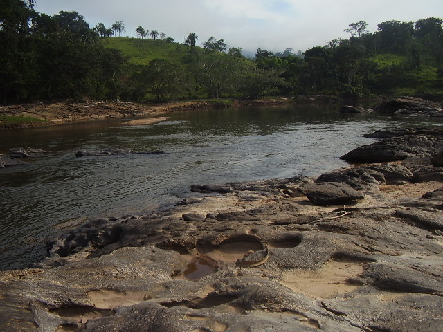 Esse é o rio Santo Antônio, rio de Minas Gerais, no município de Santo Antônio do Rio Abaixo.